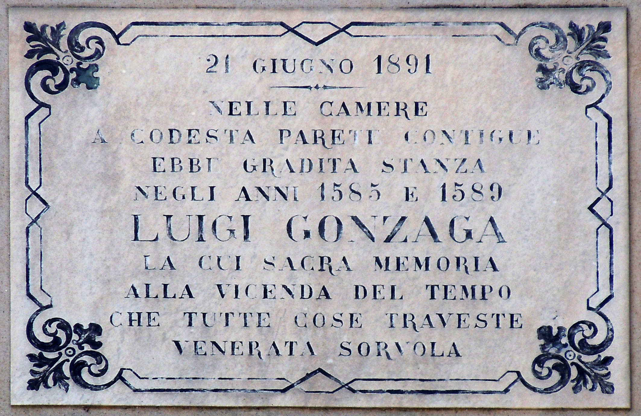 Mantova, lapide a San Luigi, in Largo San Luigi Gonzaga.